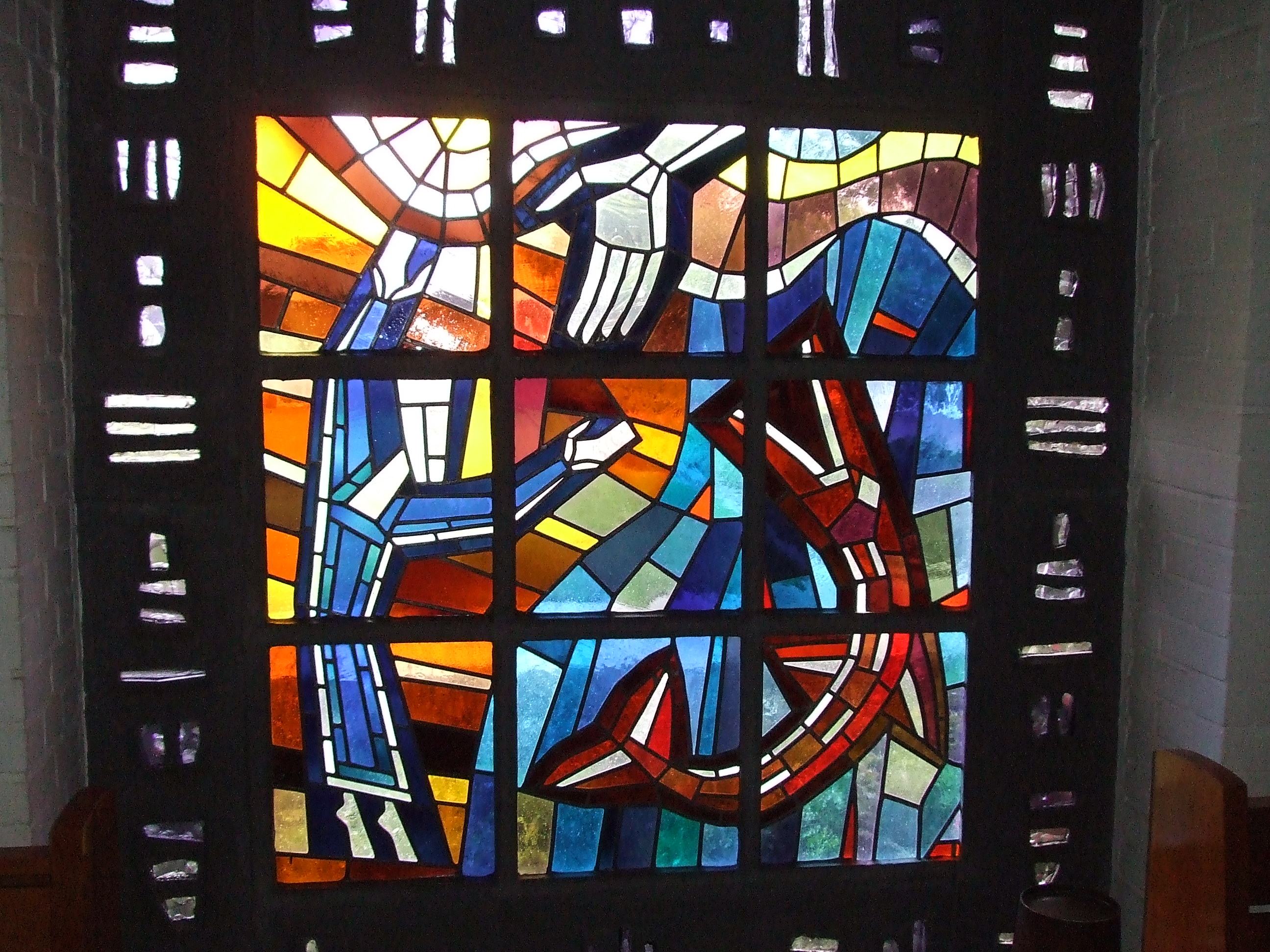 Jona-Fenster in der Apostelkirche zu Bocholt. Dieses Kunstwerk befindet sich im öffentlichen Raum, nämlich in der Ev. Apostelkirche Bocholt. Die Ev. Apostelkirche ist für die Öffentlichkeit zugängig. Darüber hinaus ist das Fenster auch von außen aus zu betrachten.